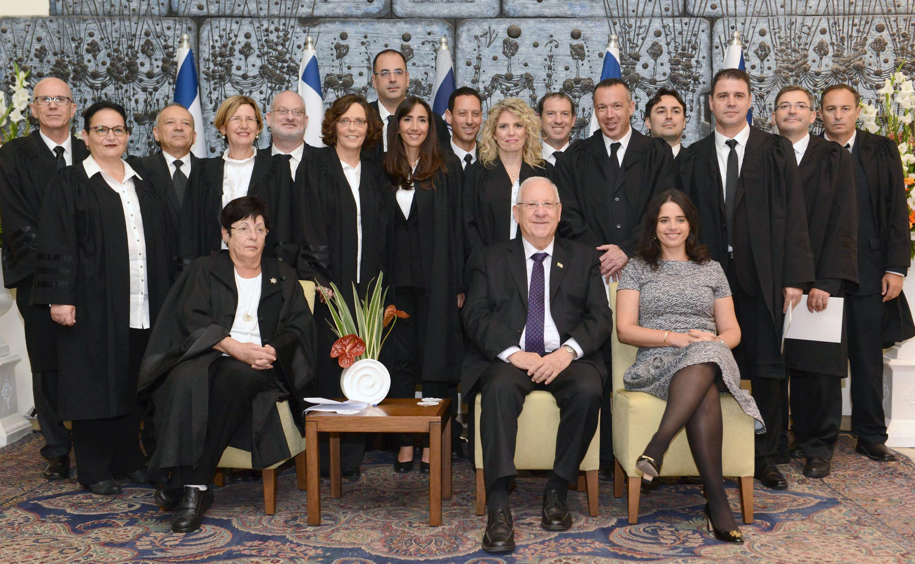 טקס השבעת שופטים בית משפט שלום ומחוזי שהתקיים בבית נשיא מדינת ישראל ראובן ריבלין בהשתתפות איילת שקד שרת המשפטים ומרים נאור נשיאת בית המשפט העליון